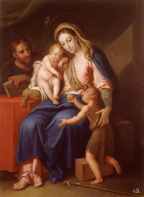 La obra representa a los tres miembros de la Sagrada Familia cristiana acompañados por el perqueño San Juan Bautista.